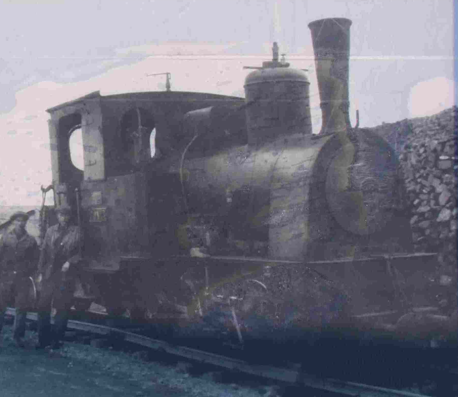 "Lok Pionier" - Foto einer Informationstafel am Hafen von Reykjavik. Die Bahn war von 1913 bis 1928 in Betrieb, daher muss das Foto in diesem Zeitraum entstanden sein (Foto der Infotafel im Juni 2009 durch Manfred E. Fritsche)